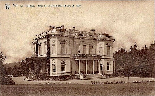 La Fraineuse